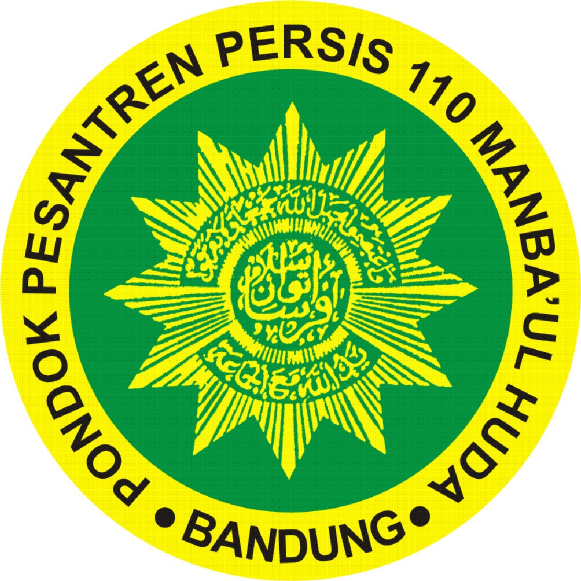 Lambang Pesantren Persis 110 Manba'ul Huda